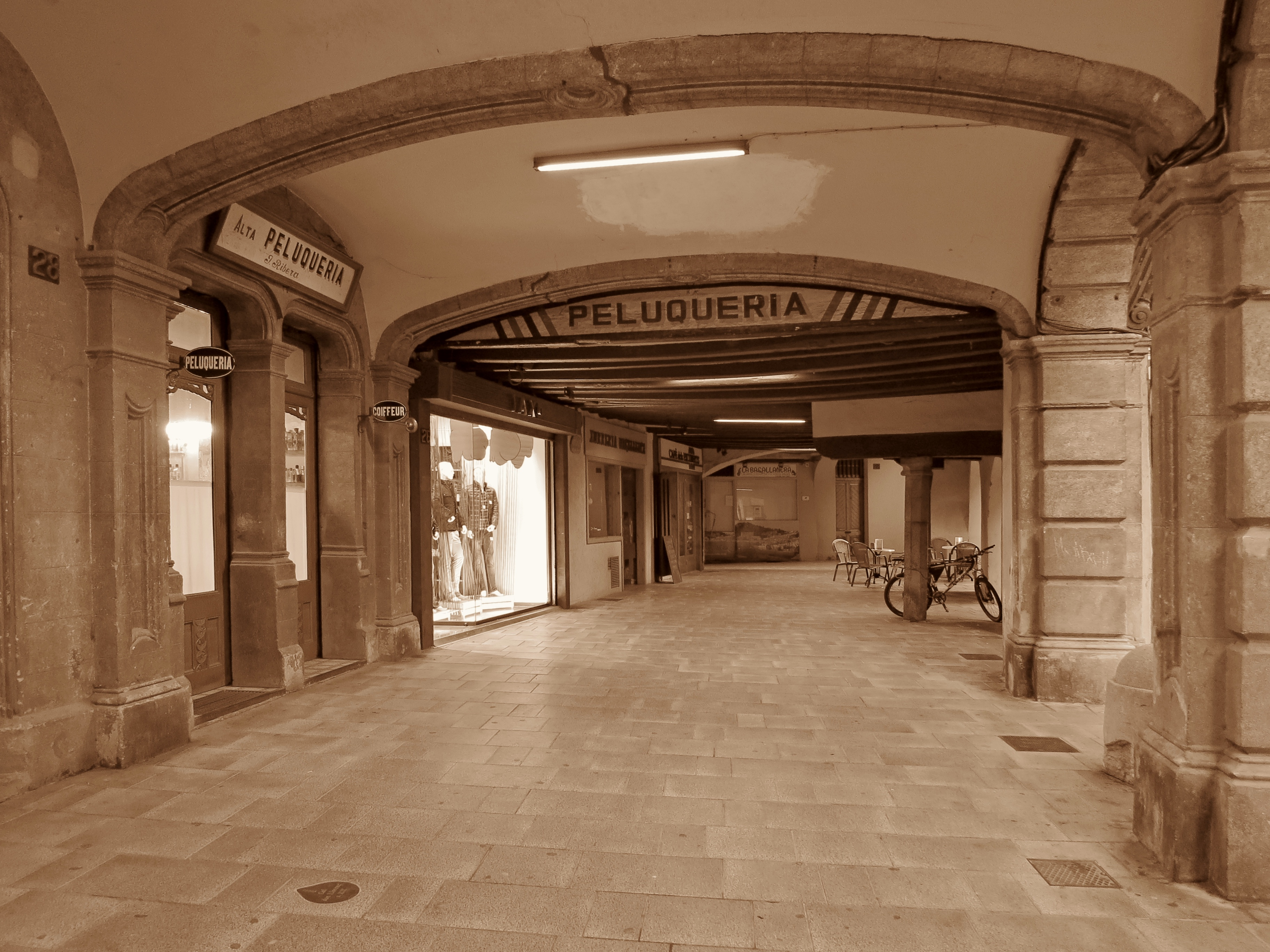 La Seu d'Urgell (Alt Urgell, Catalunya, Espanya) - Carrer Major, 28.